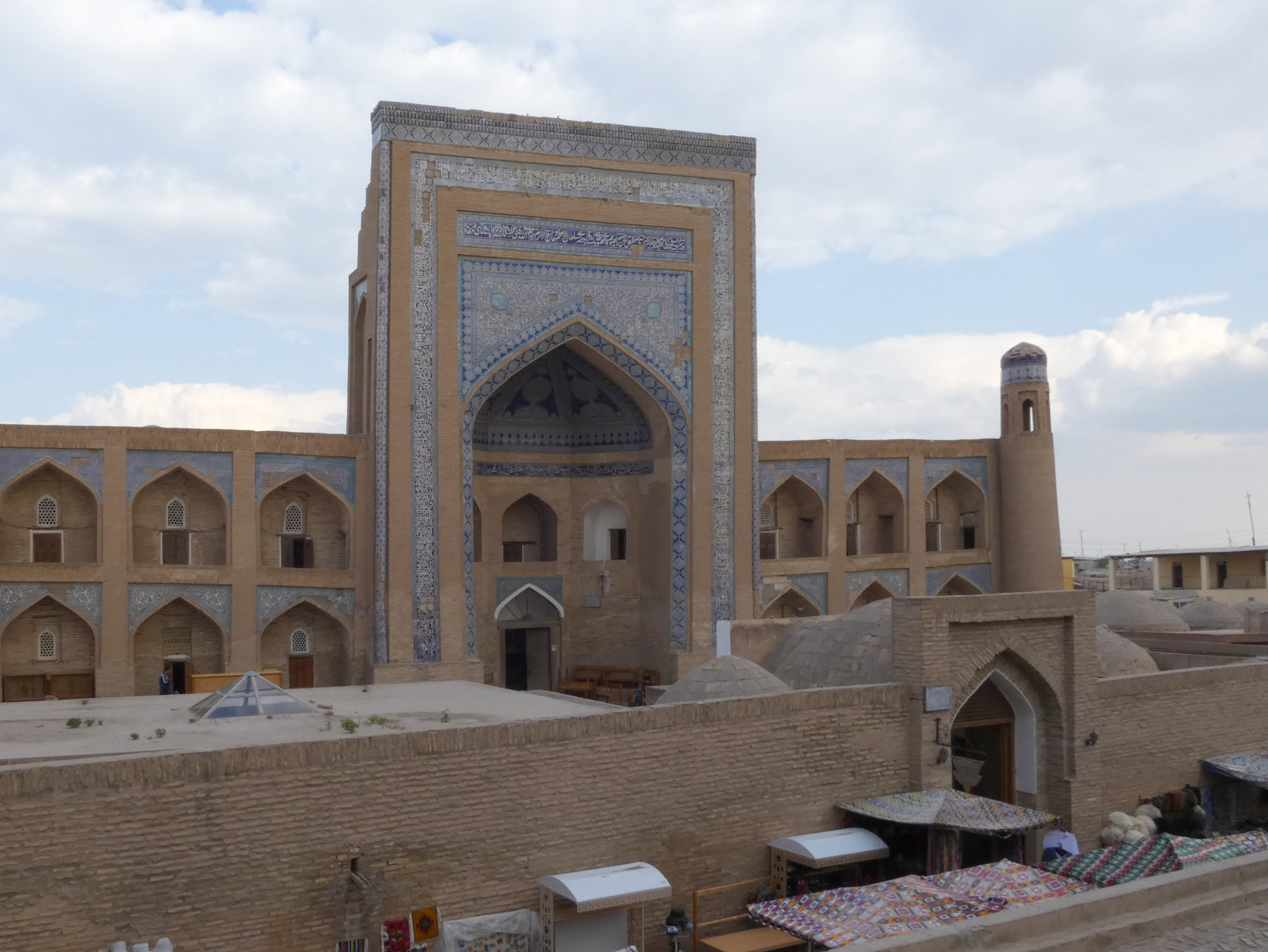 im Vordergrund einstöckig die Medrese Churdshum, dahinter zweistöckig die Medrese Alla Kuli Khan, Chiwa